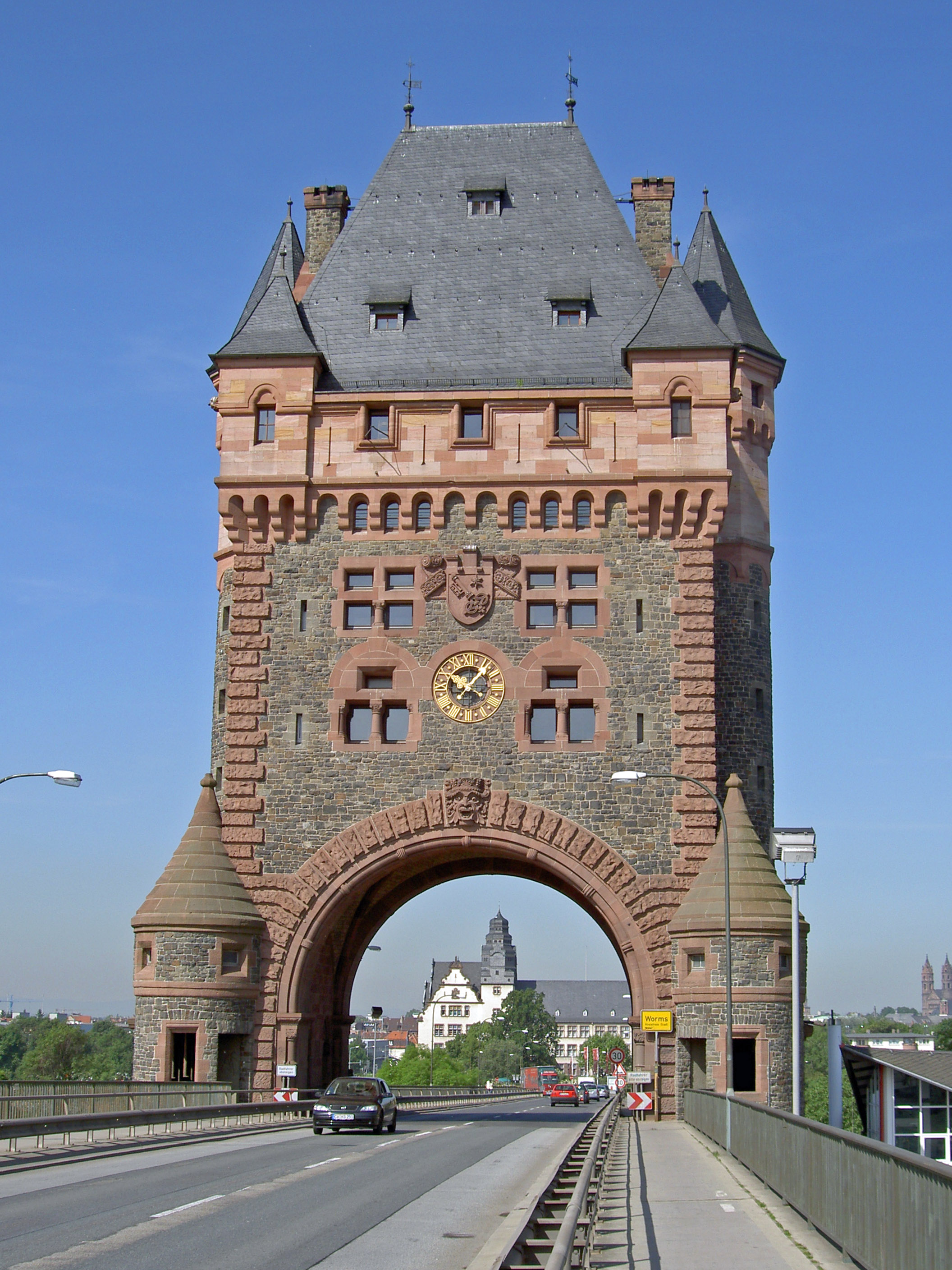 Die Nibelungenbrücke Worms über den Rhein